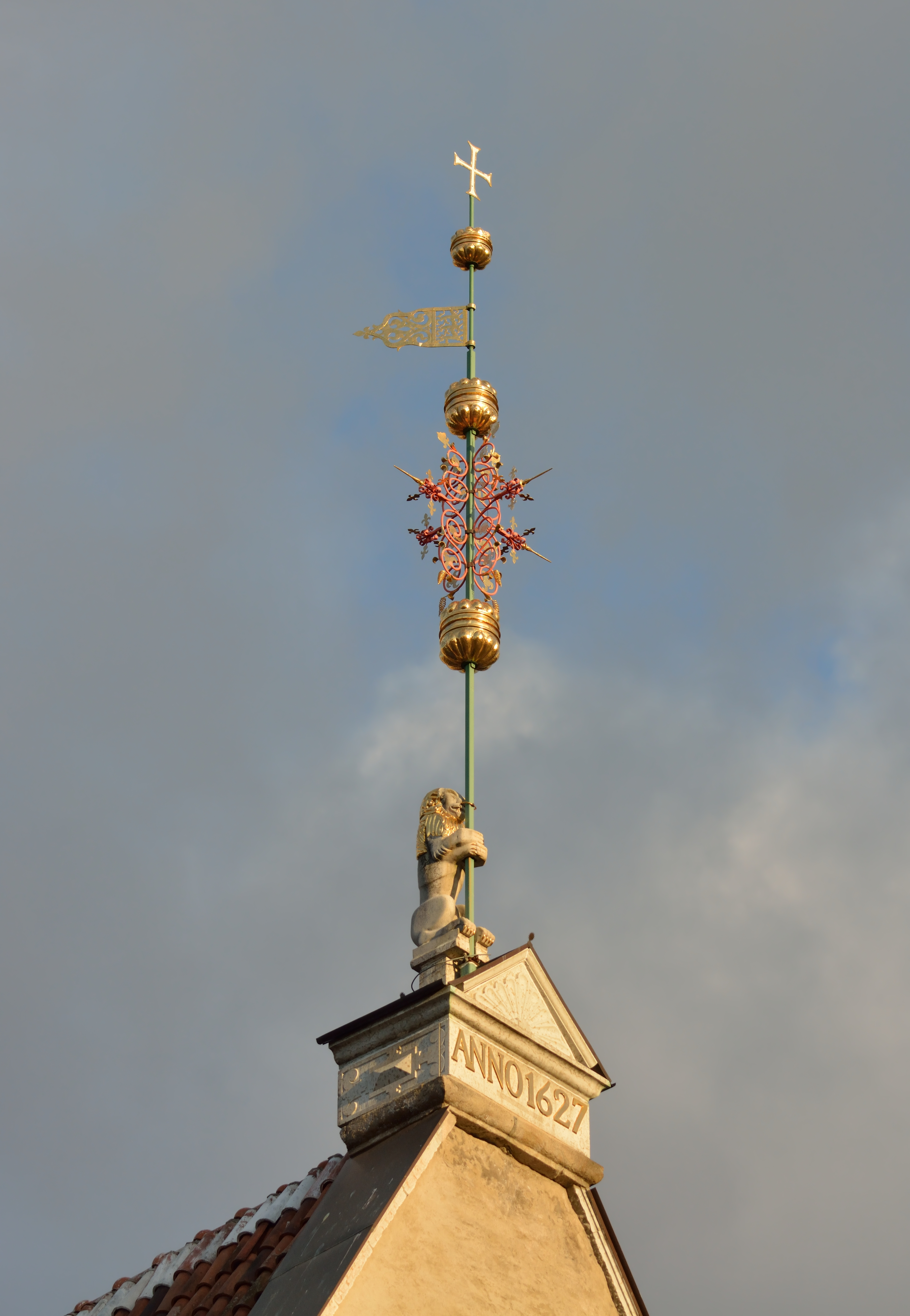 Tallinna Raekoja läänepoolne tuulelipp